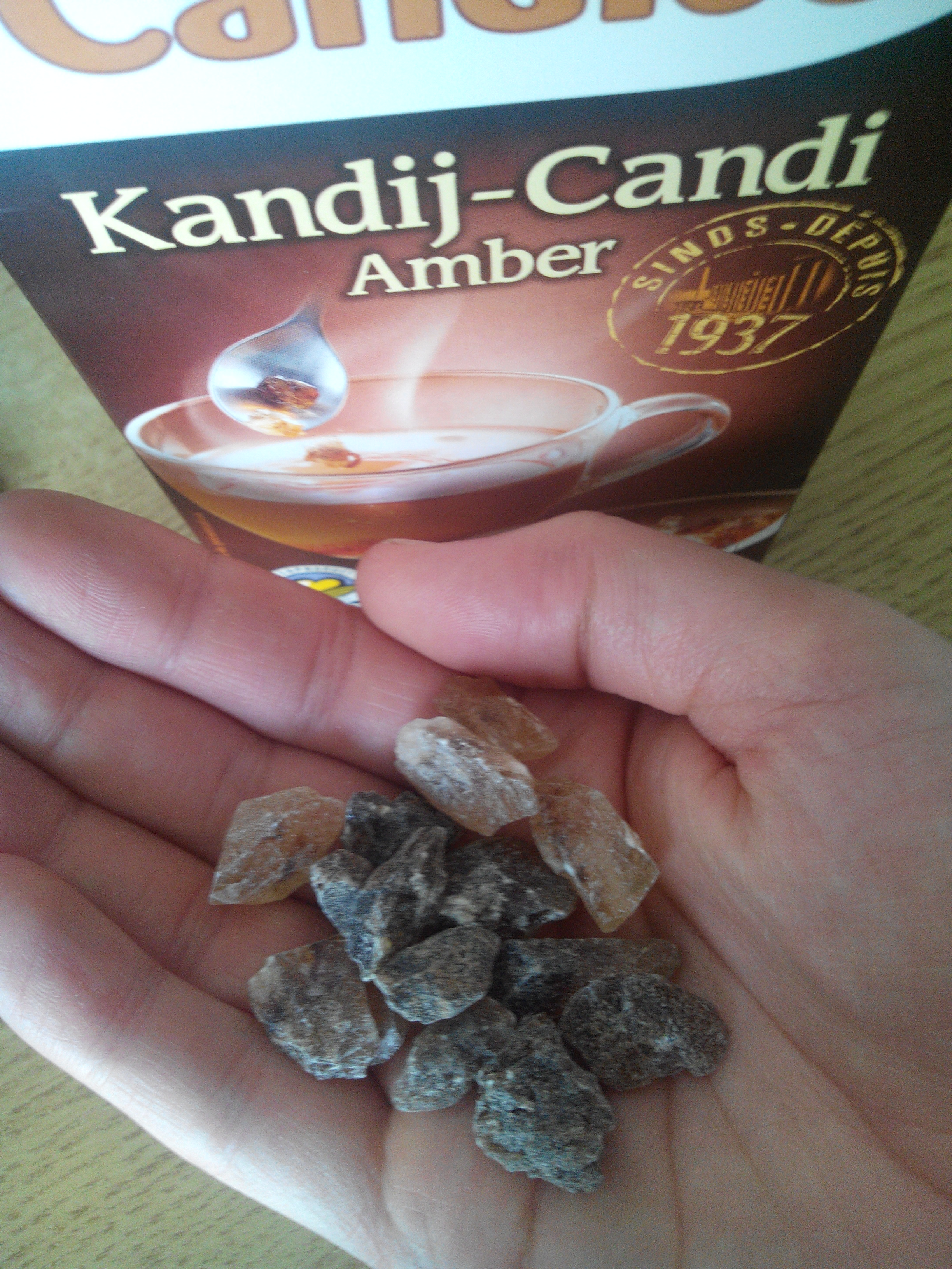 candi sugar blocs